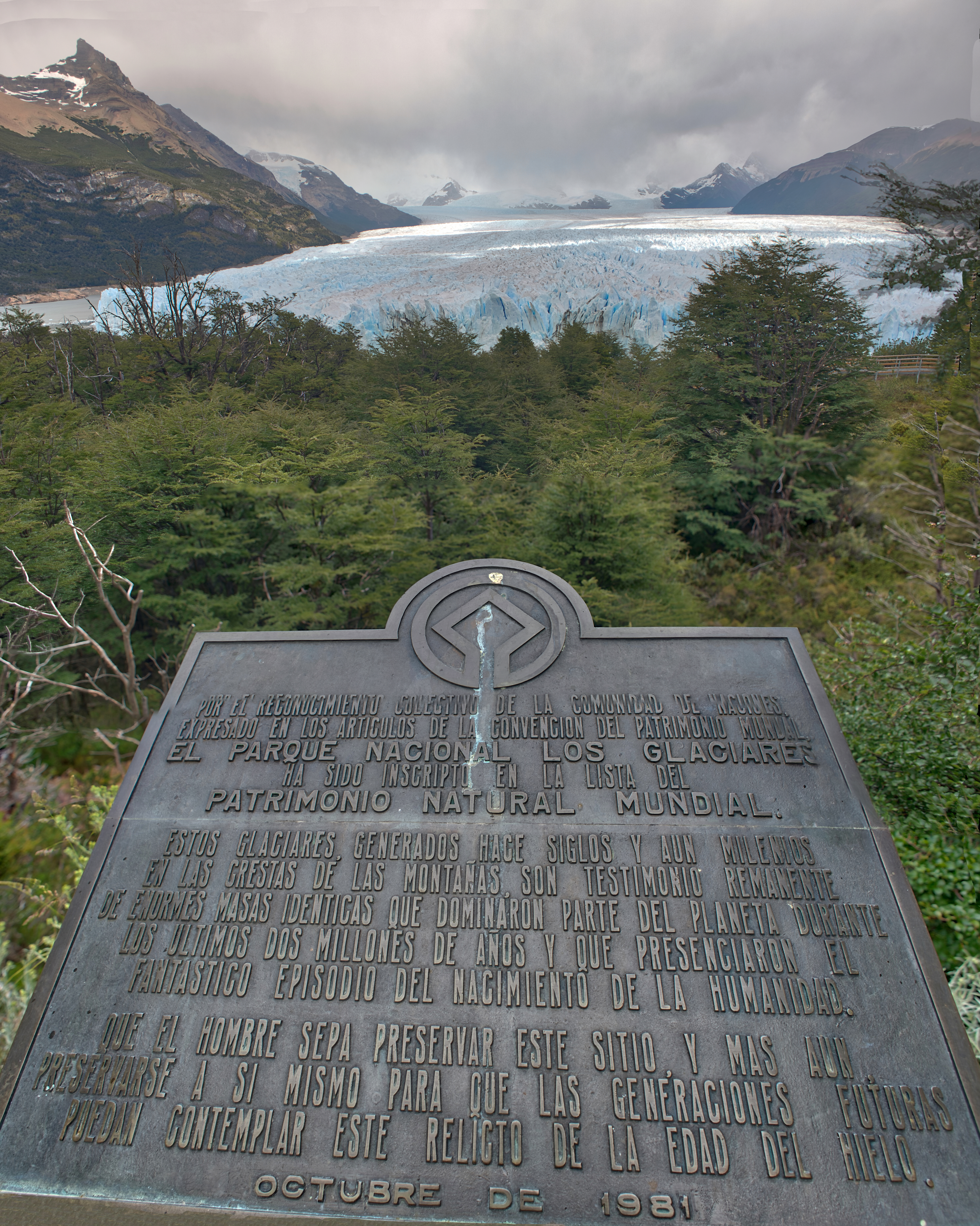 Vista desde el mirador del Glaciar Perito Moreno, Calafate, Argentina.